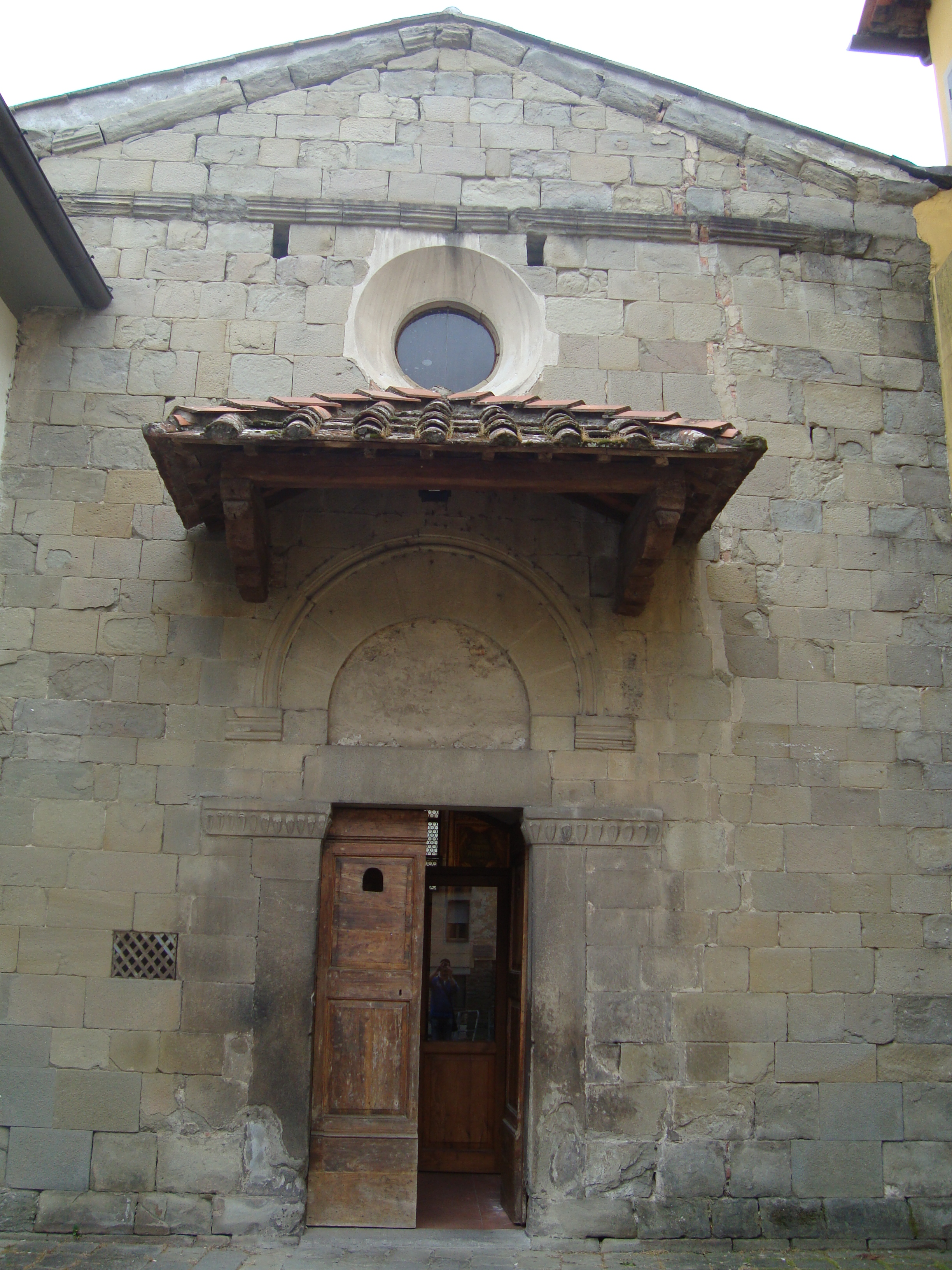 oratorio di Sant'Antonio, Pescia